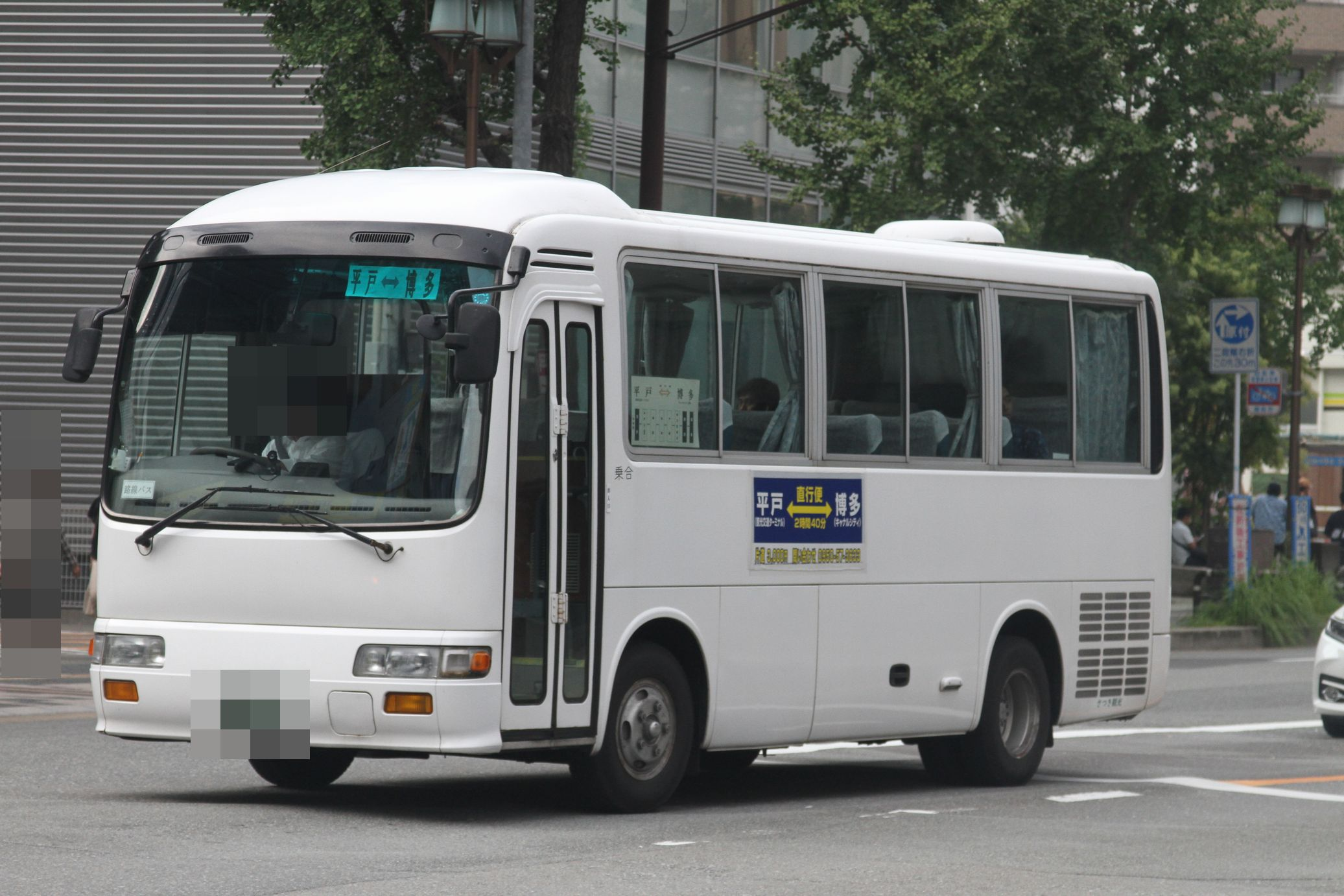 さつき観光の平戸-博多線に用いられる日野・リエッセ。YOKAROからの引継車